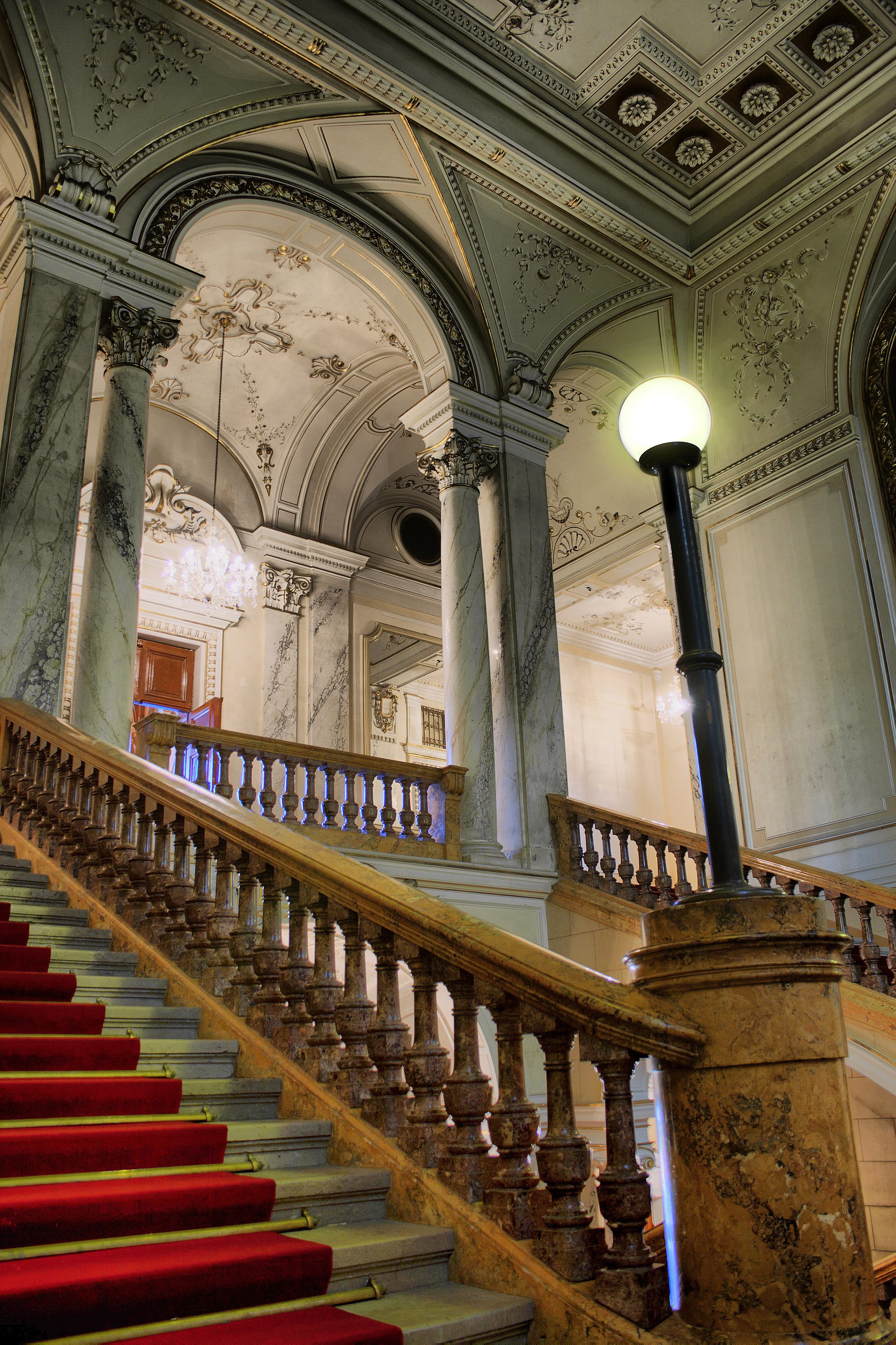 Schodiště uvnitř Císařských lázní v Karlových Varech